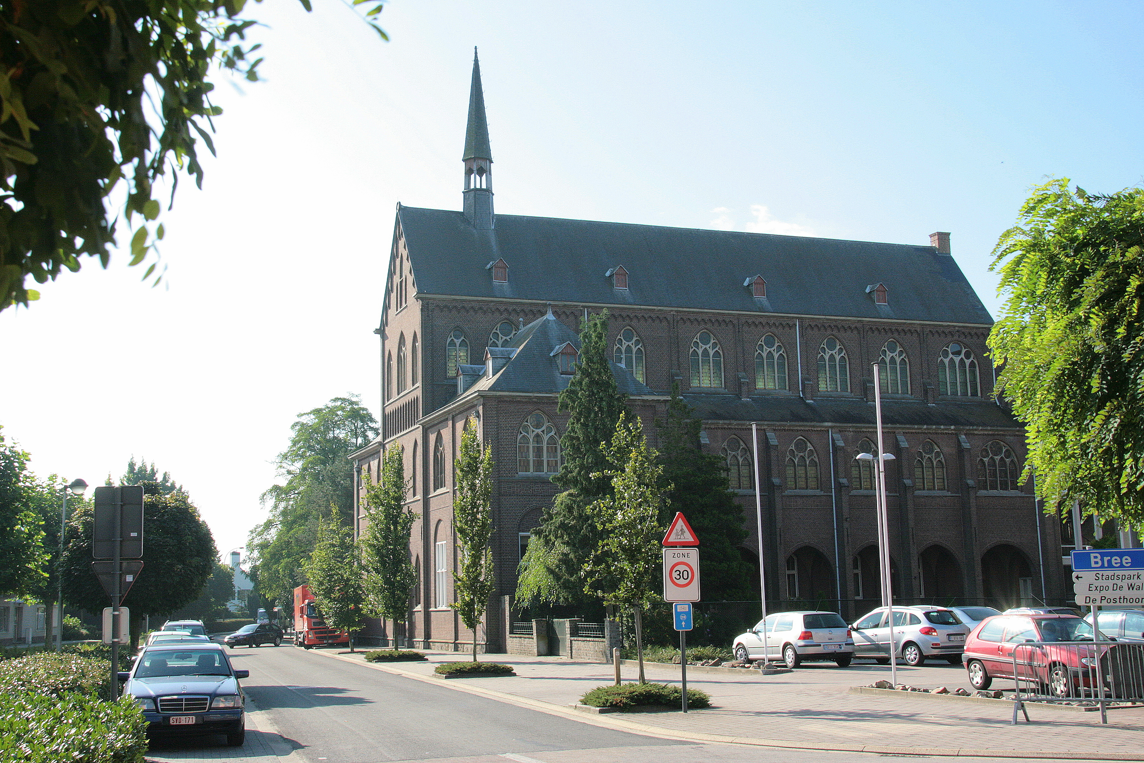 In 1839 richtten de Ursulinen een school en kloostercomplex op te Hamont. In 1913-1914 werd een grote kapel gebouwd, naar een ontwerp van de grootmeester van de neogotiek P.J.H. Cuypers.